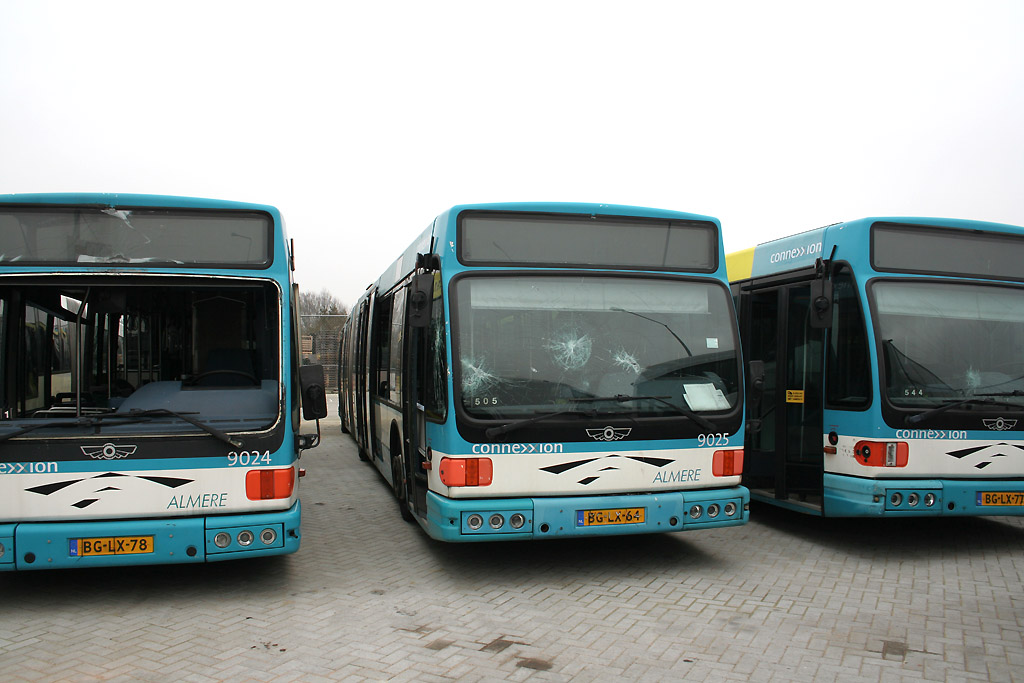 Voormalige stadsbussen voor het net van Almere.